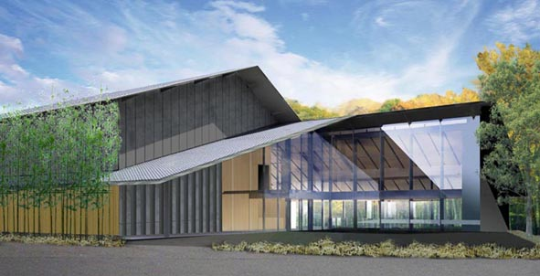 根津美術館新展示棟外観イメージ